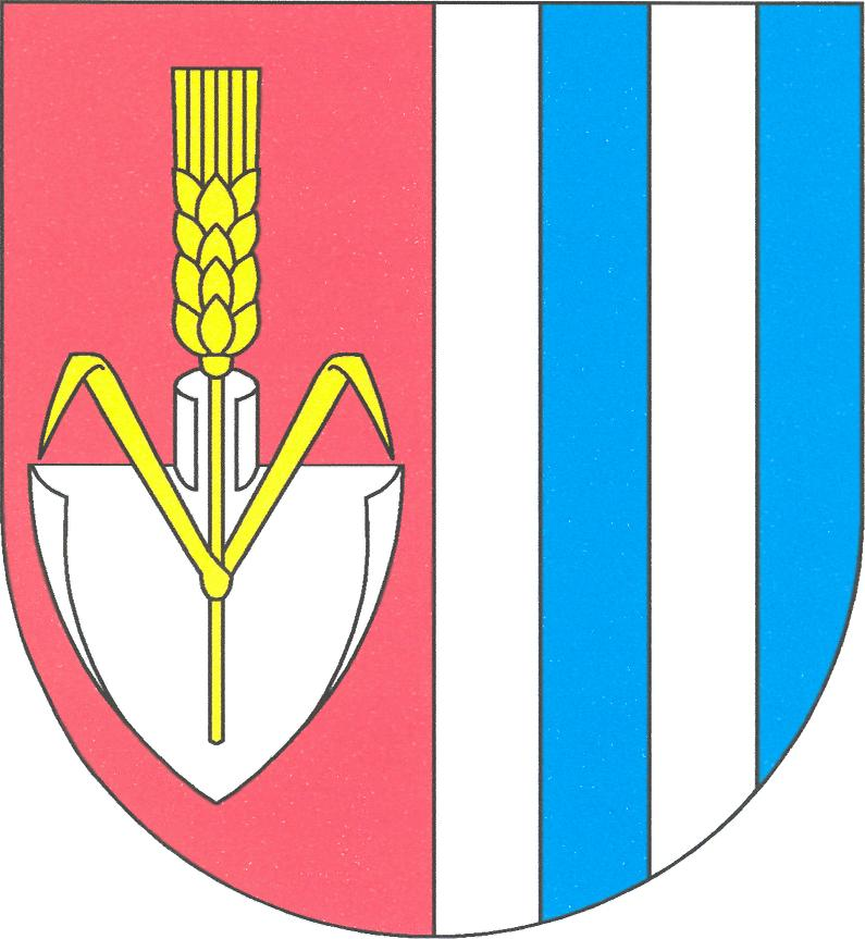 Znak obce Blažim